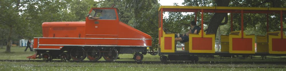 Diesellokomotive der Liliputbahn im Wiener Prater